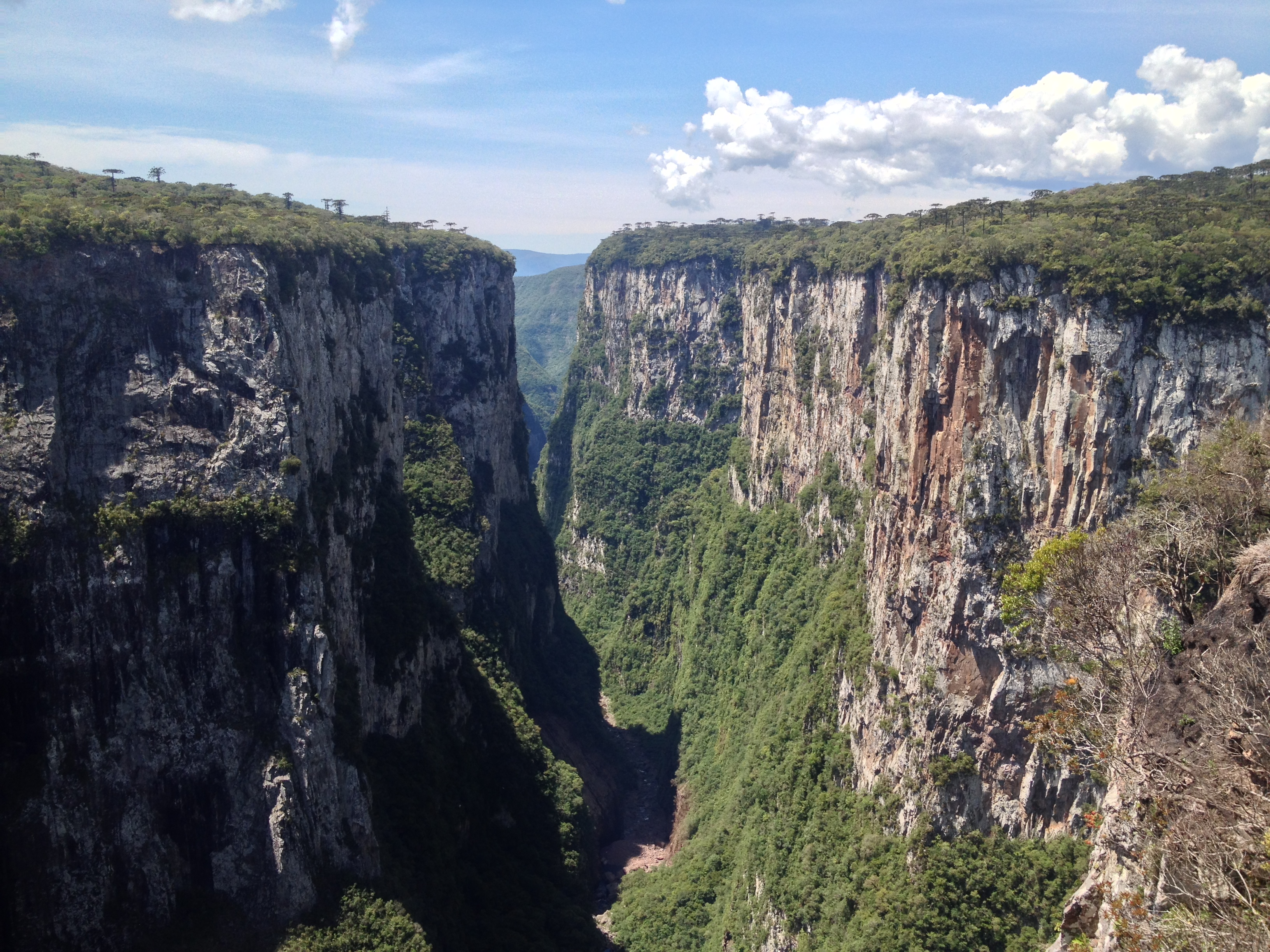 Canions